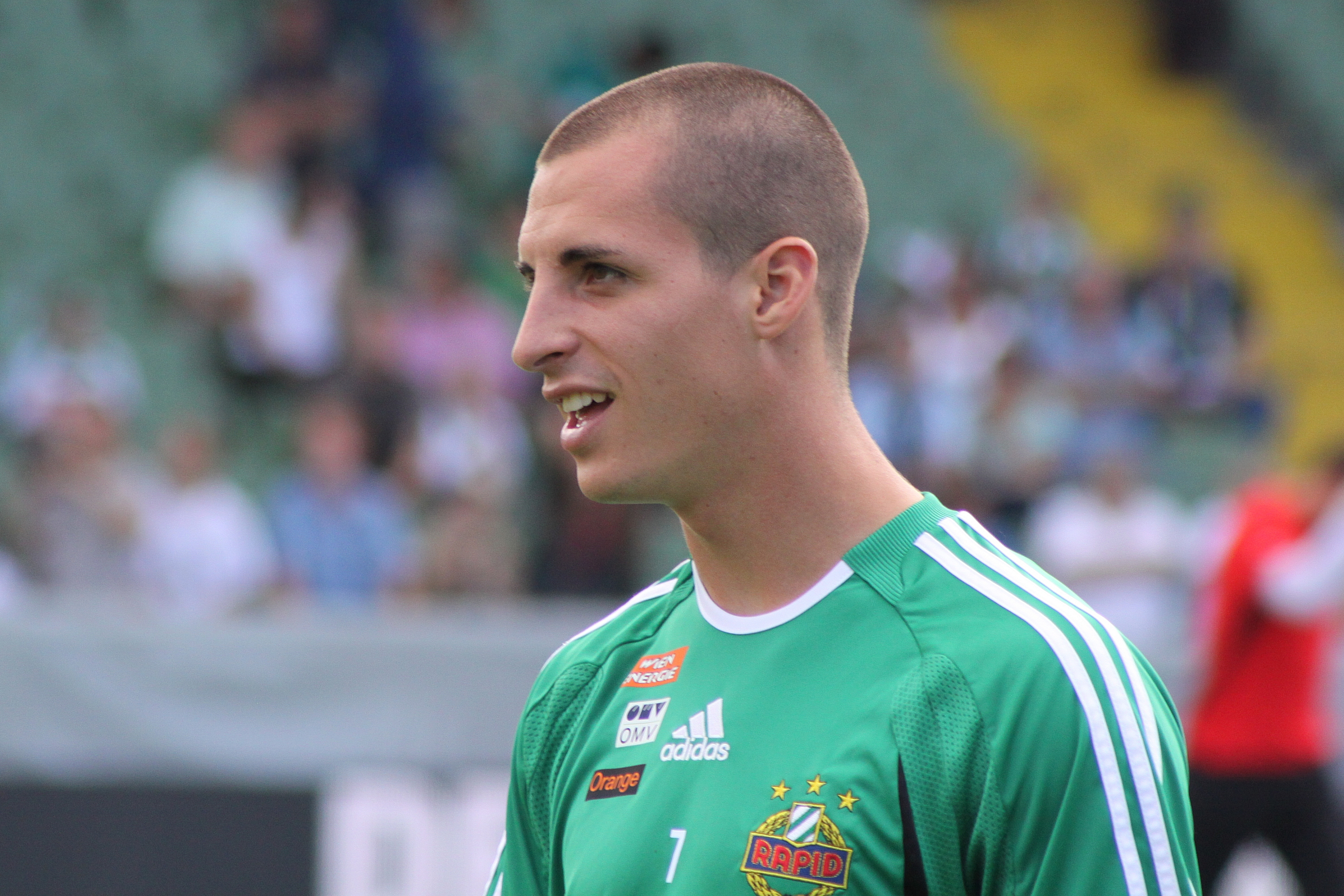 Stefan Kulovits - SK Rapid Wien (1)